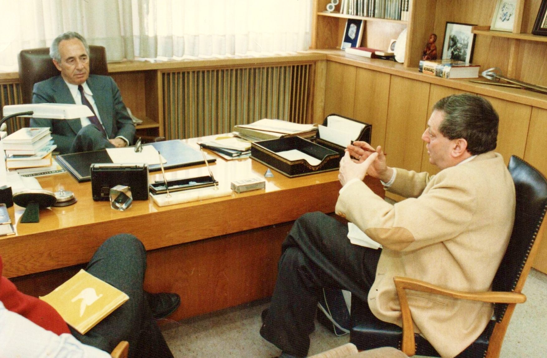 Илья Герол берет интервью у премьер министра Израиля Шимона Переса